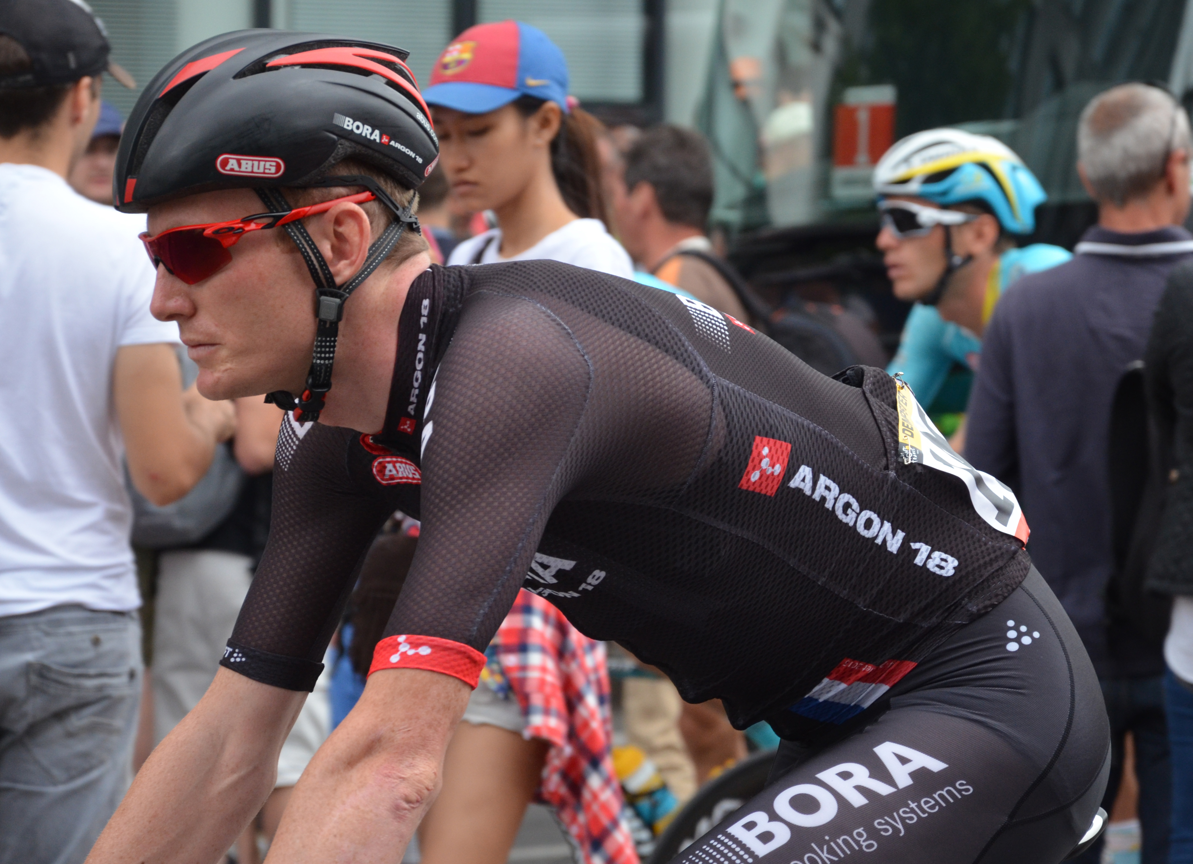 Zakkari Dempster au départ de la 8ème étape du Tour de France 2015, à Rennes.